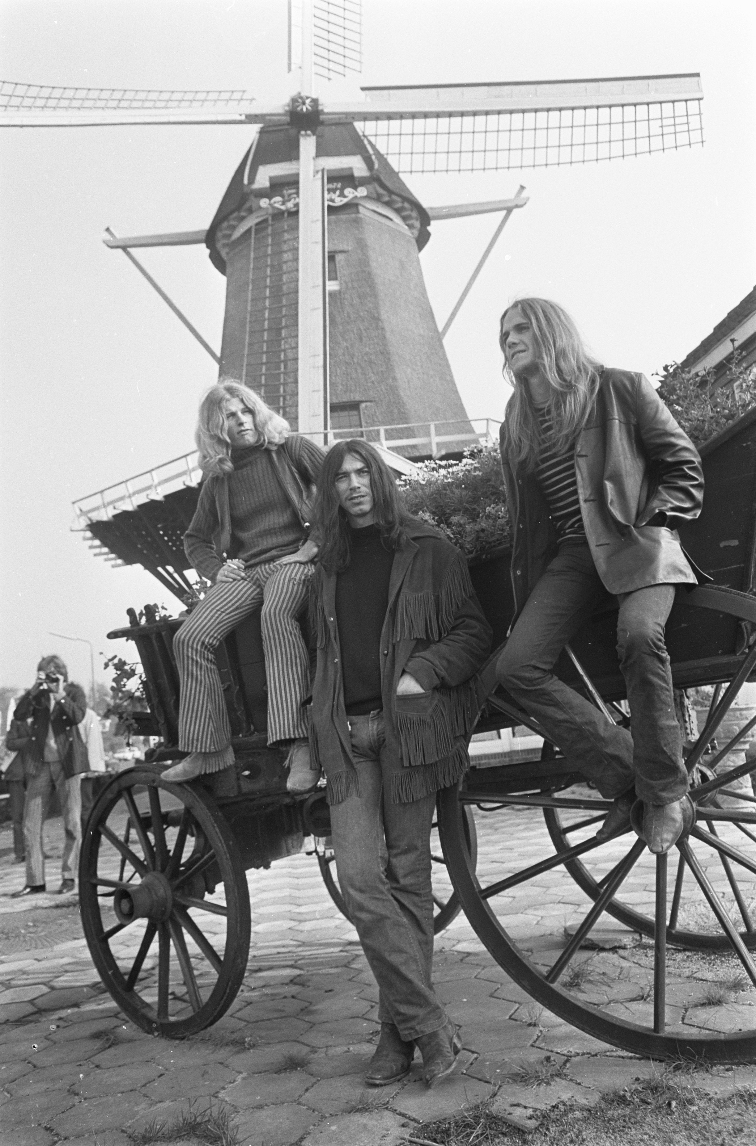 Amerikaanse beatgroep Blue Cheer" gaf persconferentie in Amstelveen hier op een boerenkar bij de molen " de Dikkert " v.l.n.r. Richard "Dickie" Peterson, Randy Holden en Paul Whaley. Holden was de vervanger van gitarist Leigh Stephens. Na een jaar touren verliet hij de band weer.